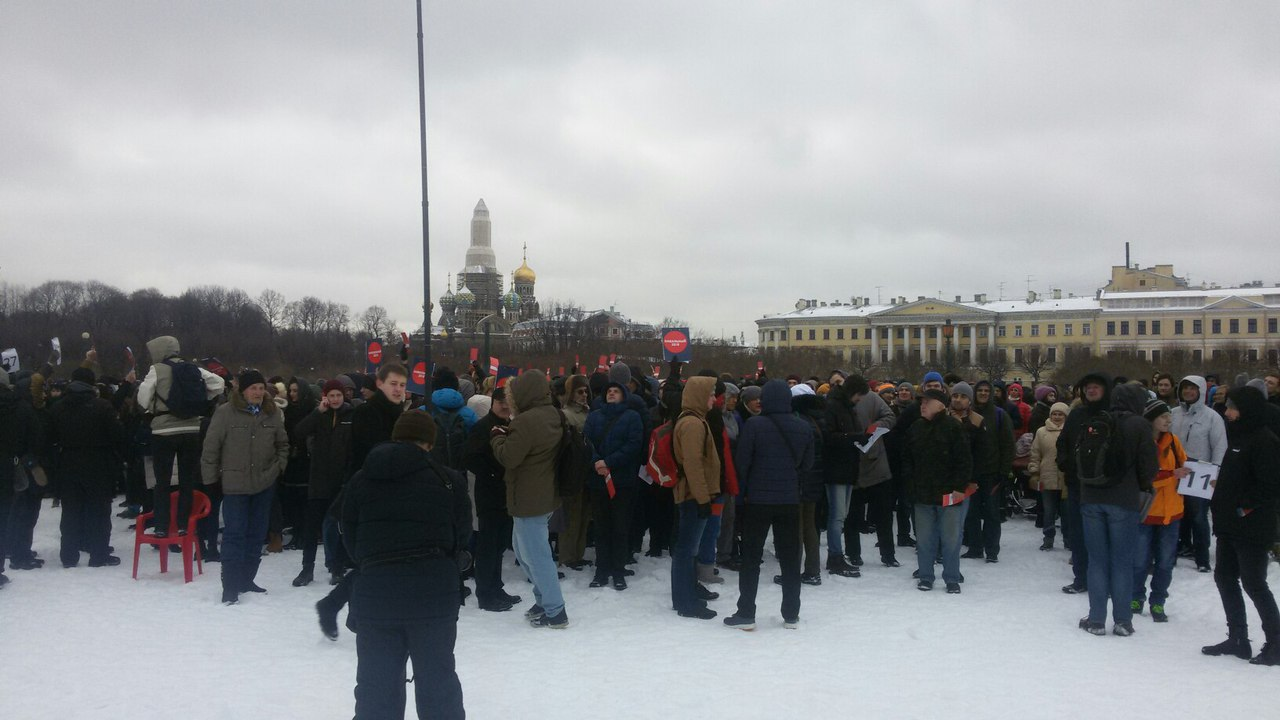 Участники инициативной группы по выдвижению Алексея Навального кандидатом на пост Президента РФ в Санкт-Петербурге